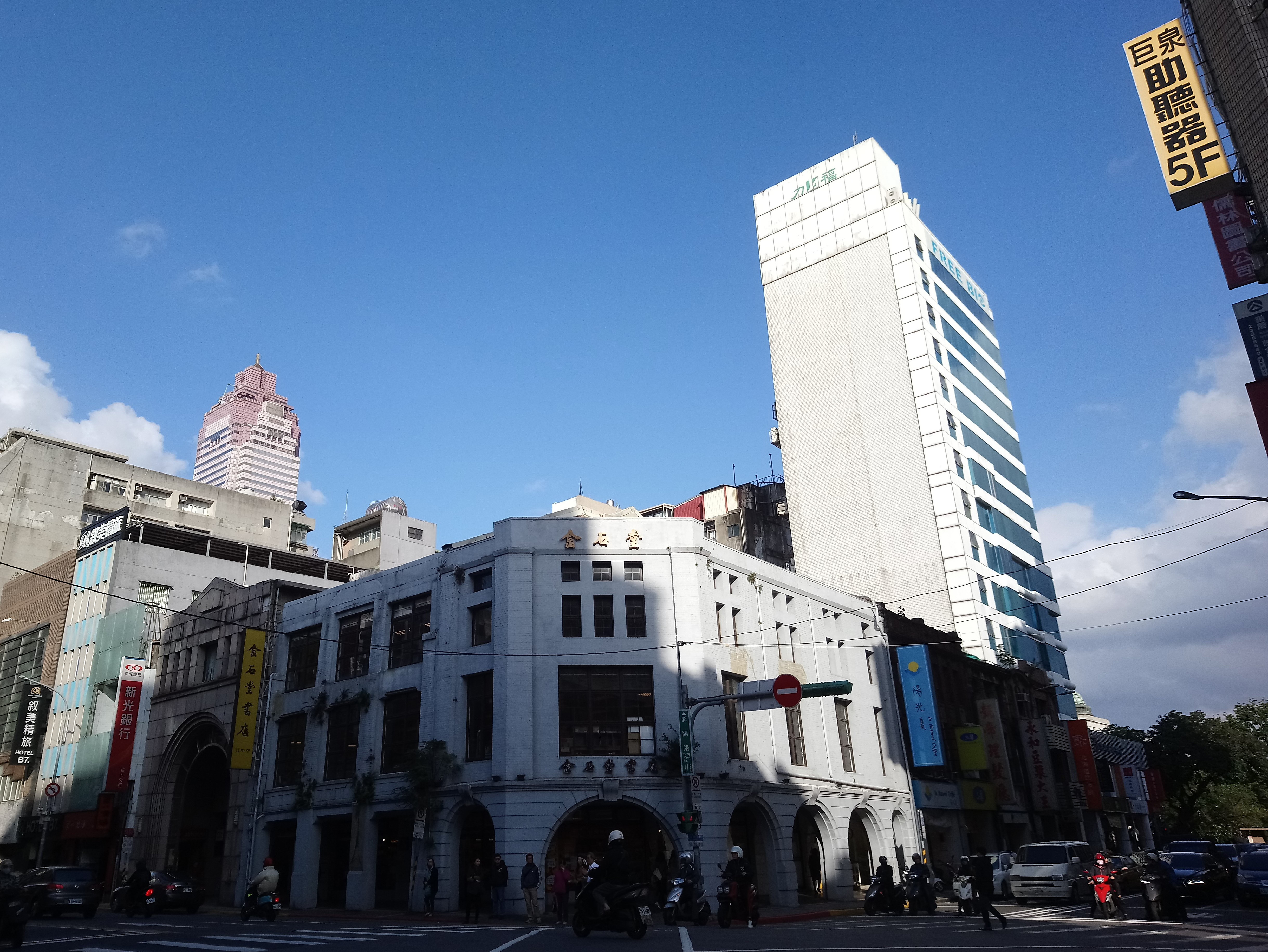 金石堂書店城中店(原西尾商店),位於臺北市中正區重慶南路一段(原本町通)與衡陽路(原榮町通)口,臺北市中正區城內次分區黎明里